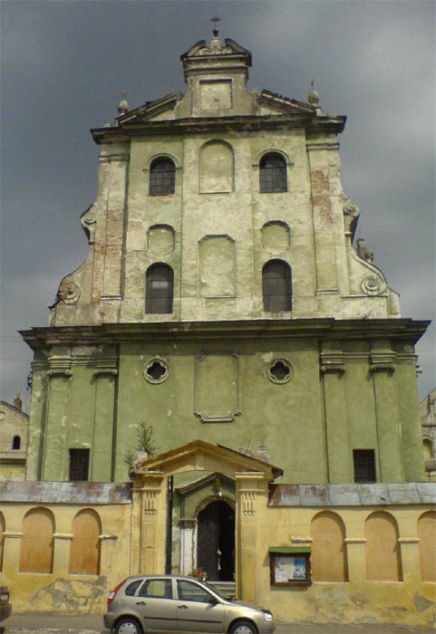 Домініканський костел (церква св. вм. Йосафата): м. Жовква, Львівська обл.